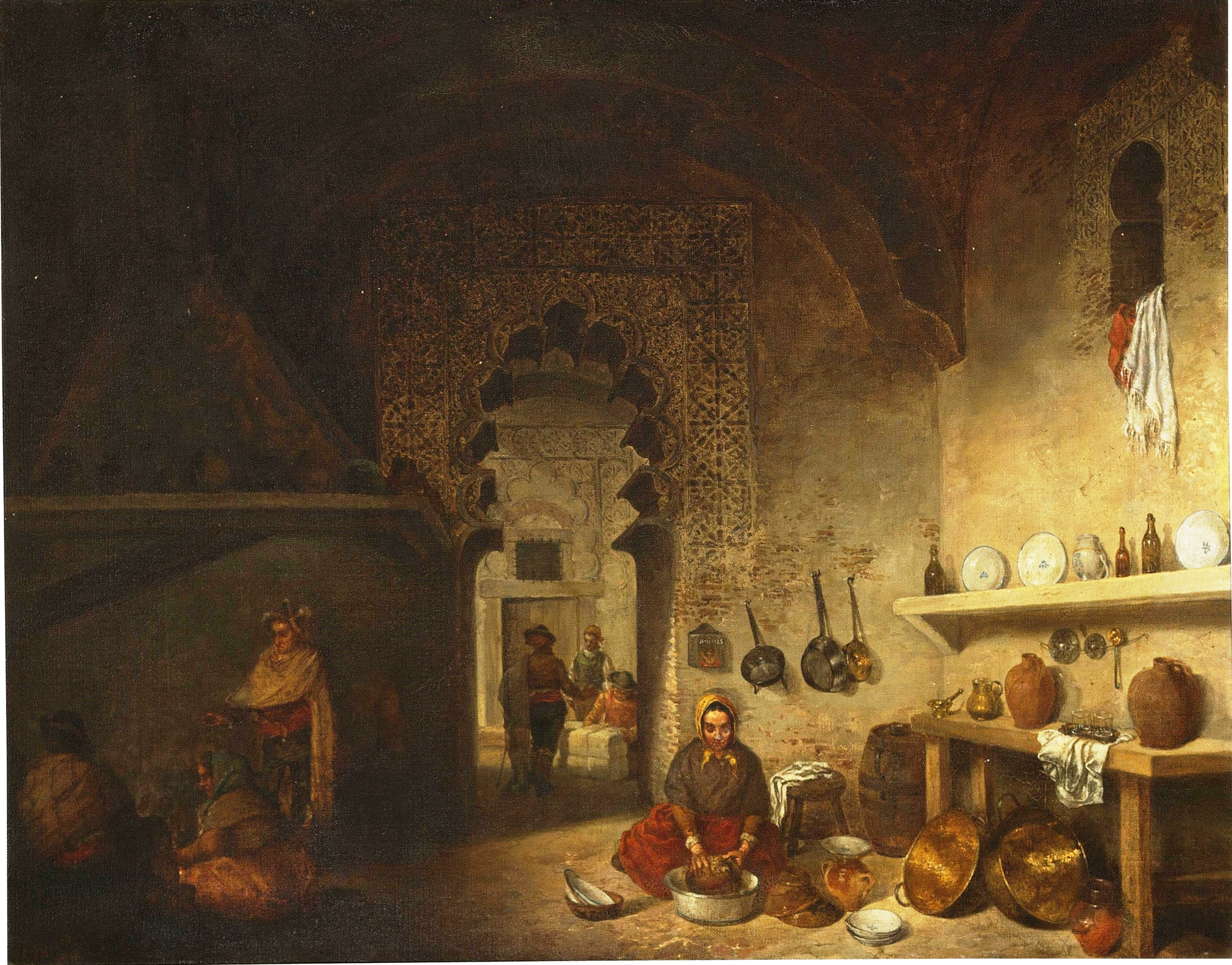 La obra representa la cocina de una posada del pueblo de Maqueda, que se halla en la provincia de Toledo, (Spain).